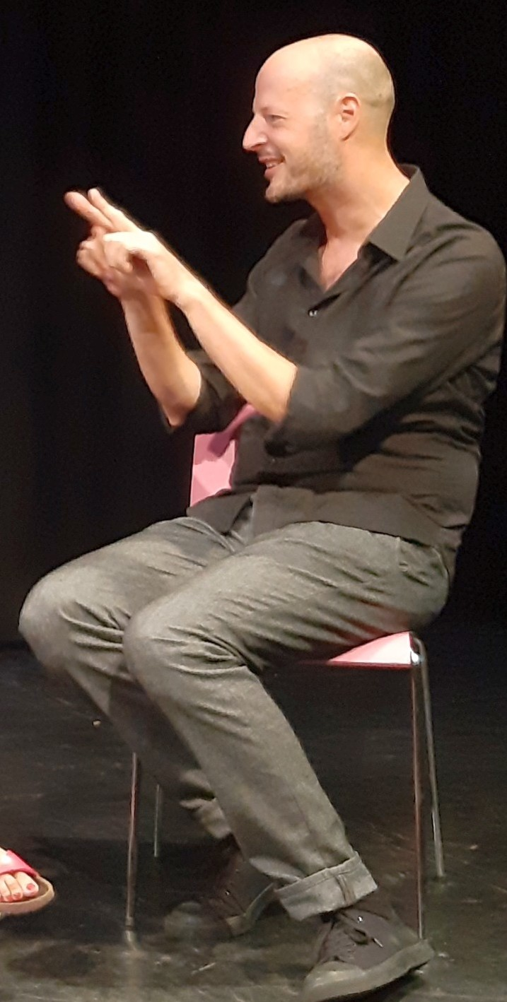 Philipp Lux zur Saisoneröffnung 2019 im Staatsschauspiel Dresden